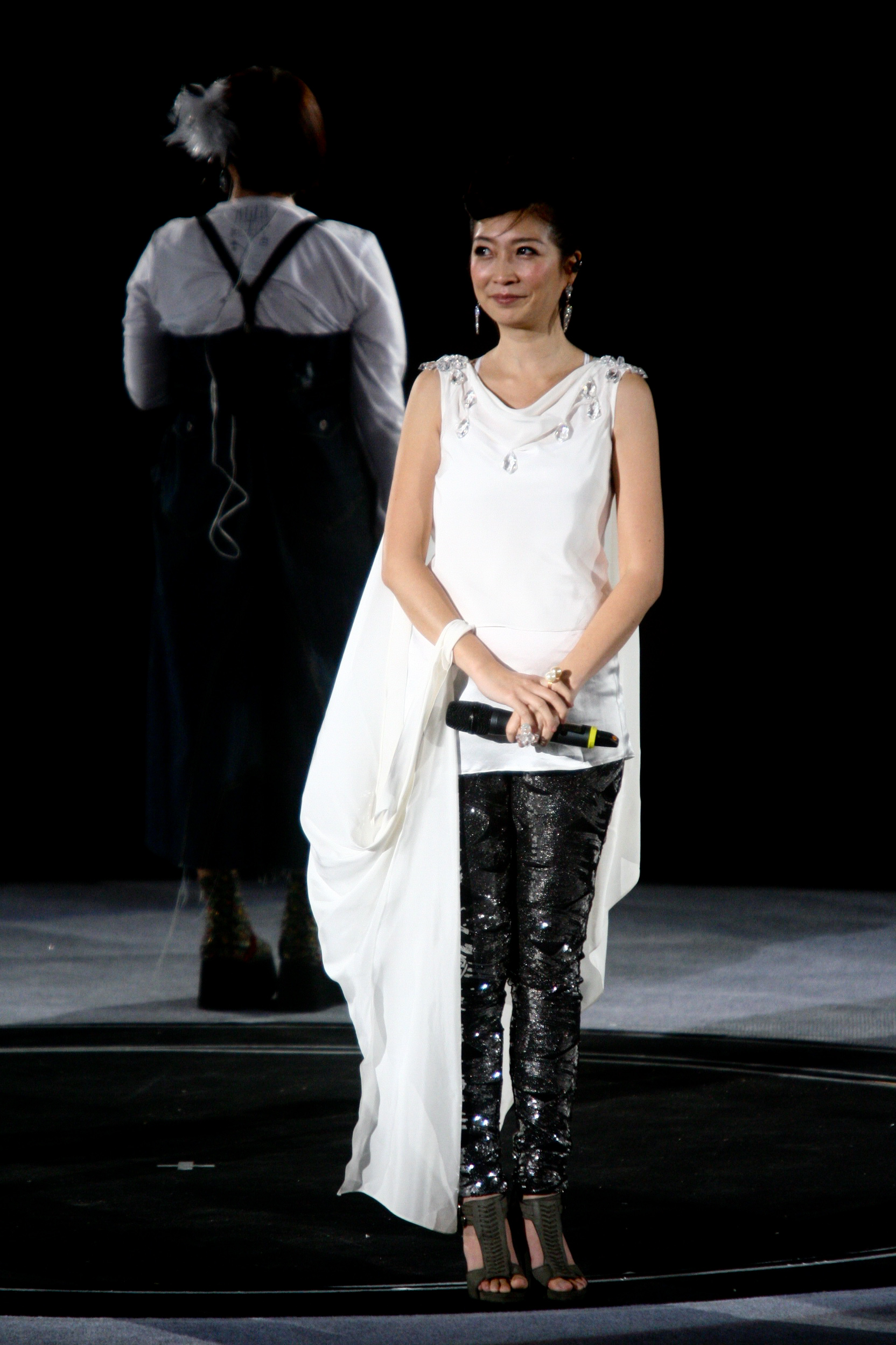 黃嘉千出席滾石唱片30周年演唱會。